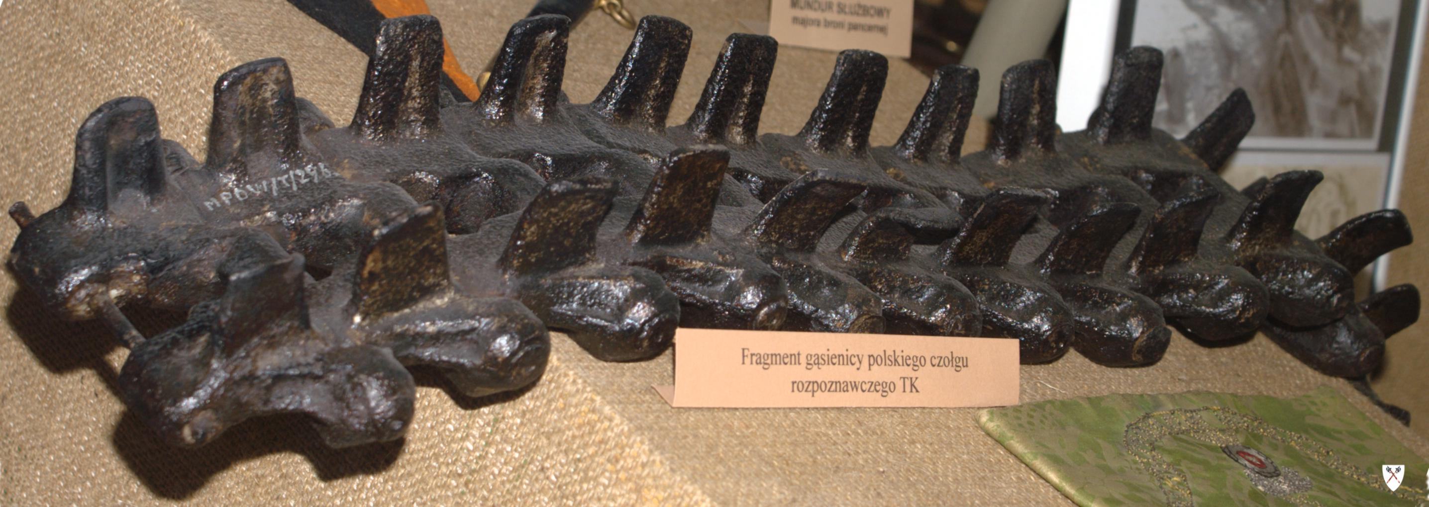 Gąsienica czołgu TKS i TK-3 w Pomorskim Muzeum Wojskowym.